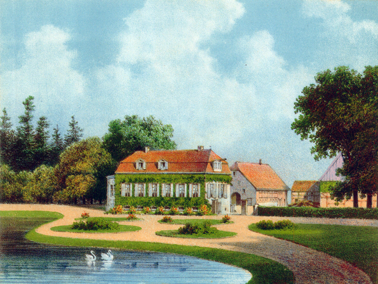 Haus Geist in der Gemeinde Lamberti heute Münster